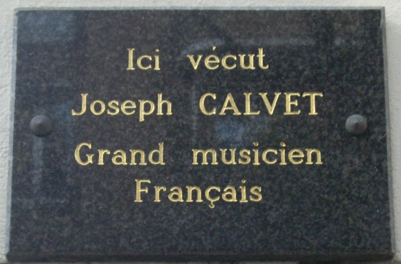 Plaque commémorative, 2 rue Gervex, Paris 17e. « Ici vécut Joseph Calvet, grand musicien français. »